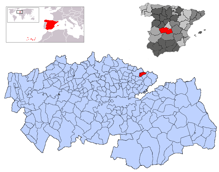 Yeles en la provincia de Toledo